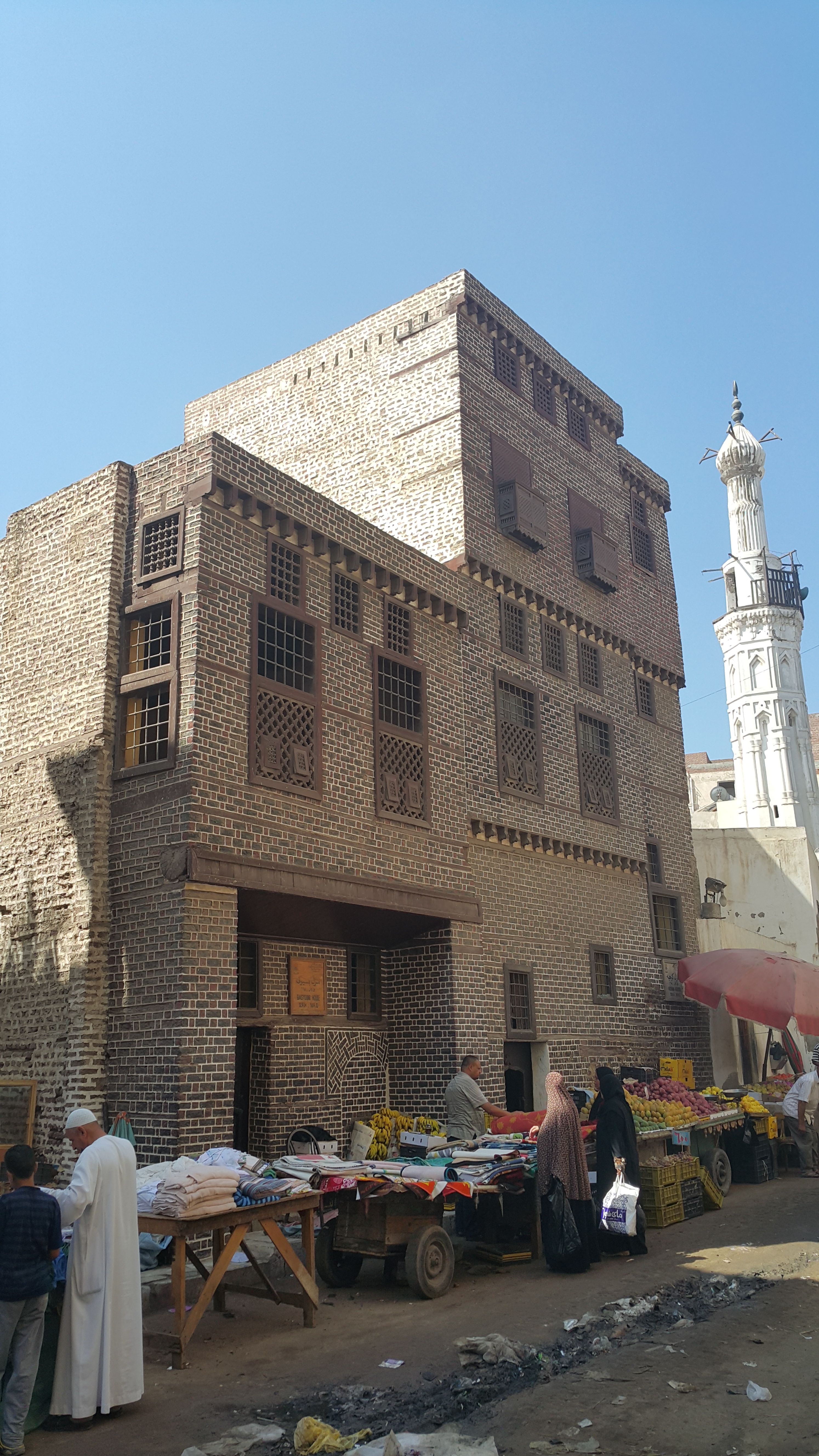 منزل علي الطراز العثماني بمدينة رشيد